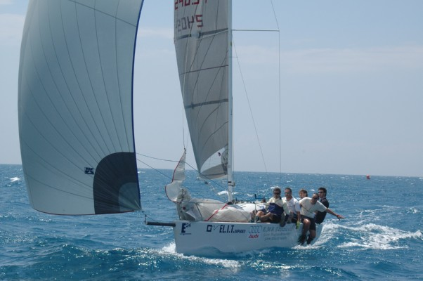 Este 24, one design